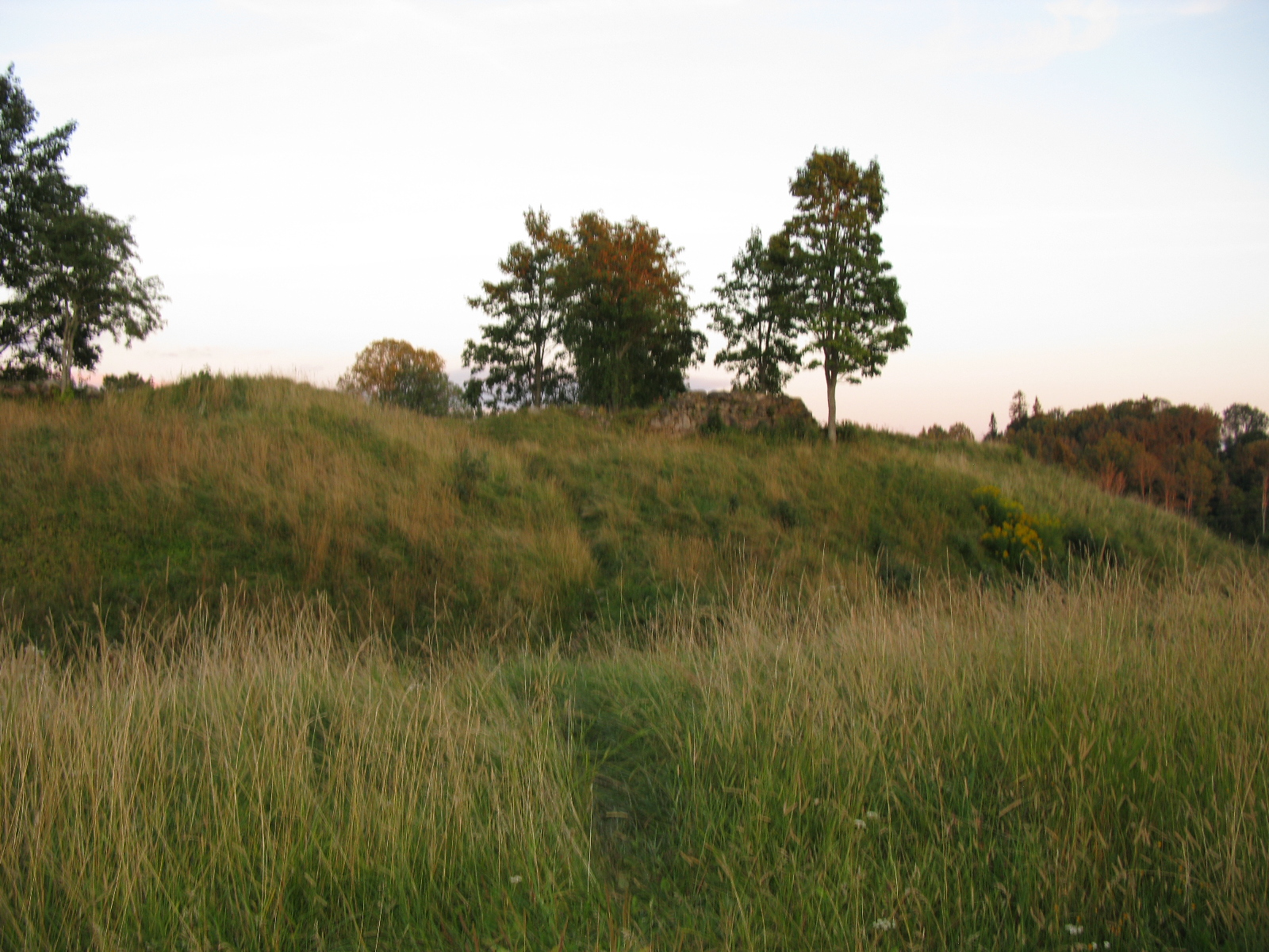 Vaade linnusekõrgendikule loodest. Näha läänepoolne vallikraav ja peavärava asukoht lääneküljel.